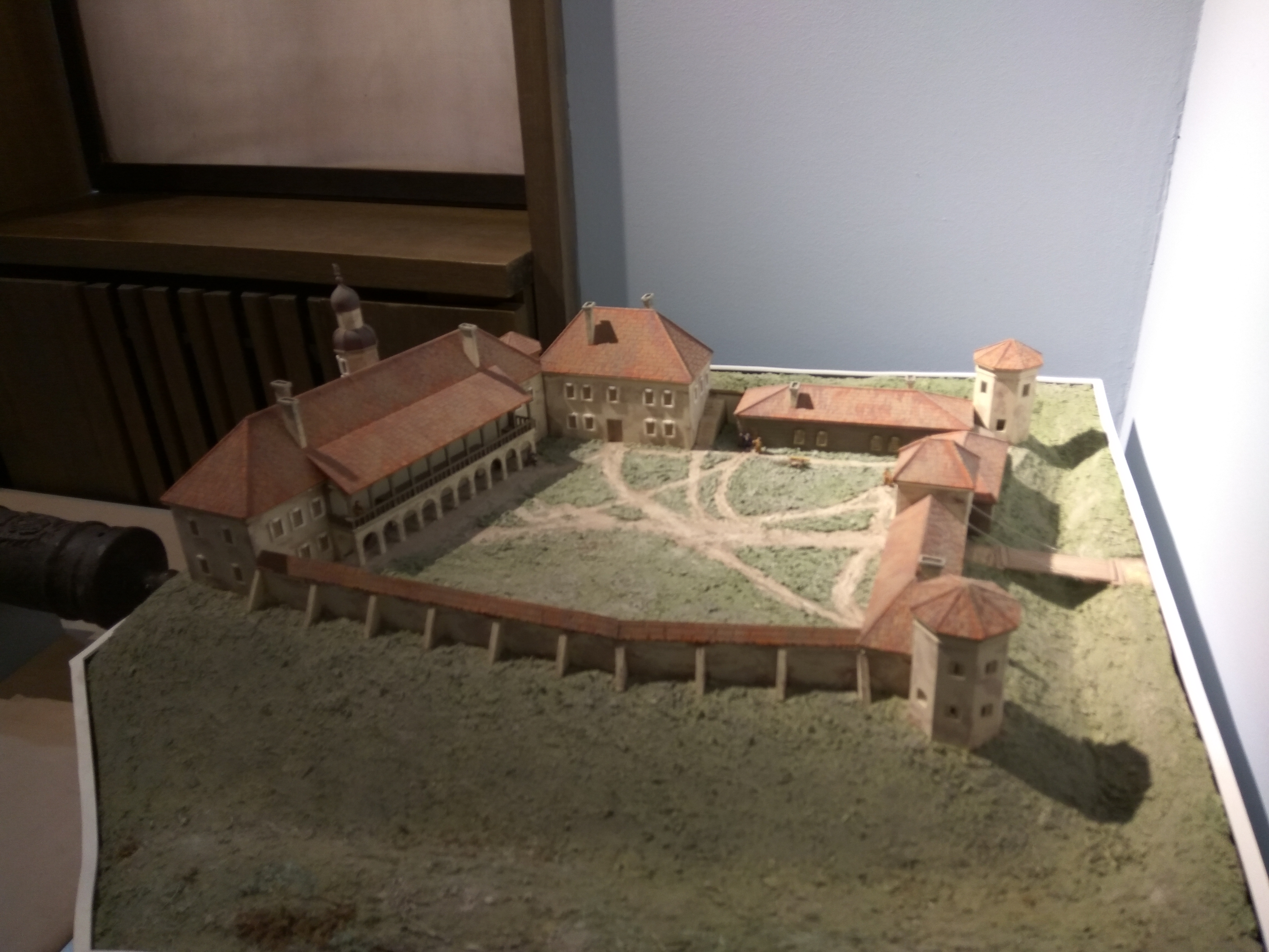 Магілёўскі абласны краязнаўчы музей. Гісторыя краю з IX ст. да 1917 г. Макет Быхаўскага замка